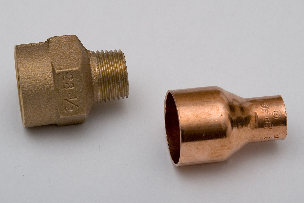 Reduzierstücke aus Rotguss (28-1/2") und Kupfer (28-15).